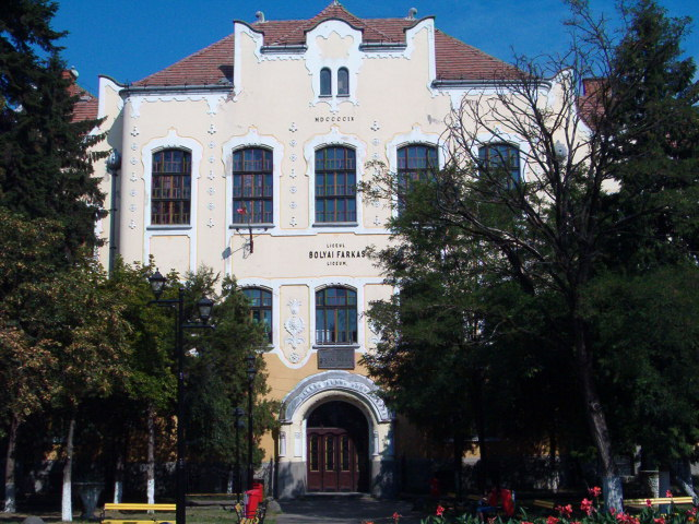 Marosvásárhely:Bolyai Farkas Líceum